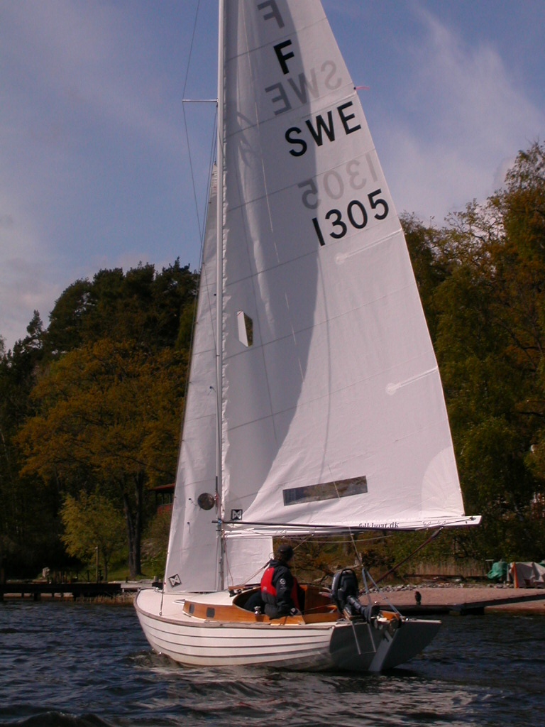 Nordisk Folkbåt SWE 1305. Fotograf Sander.